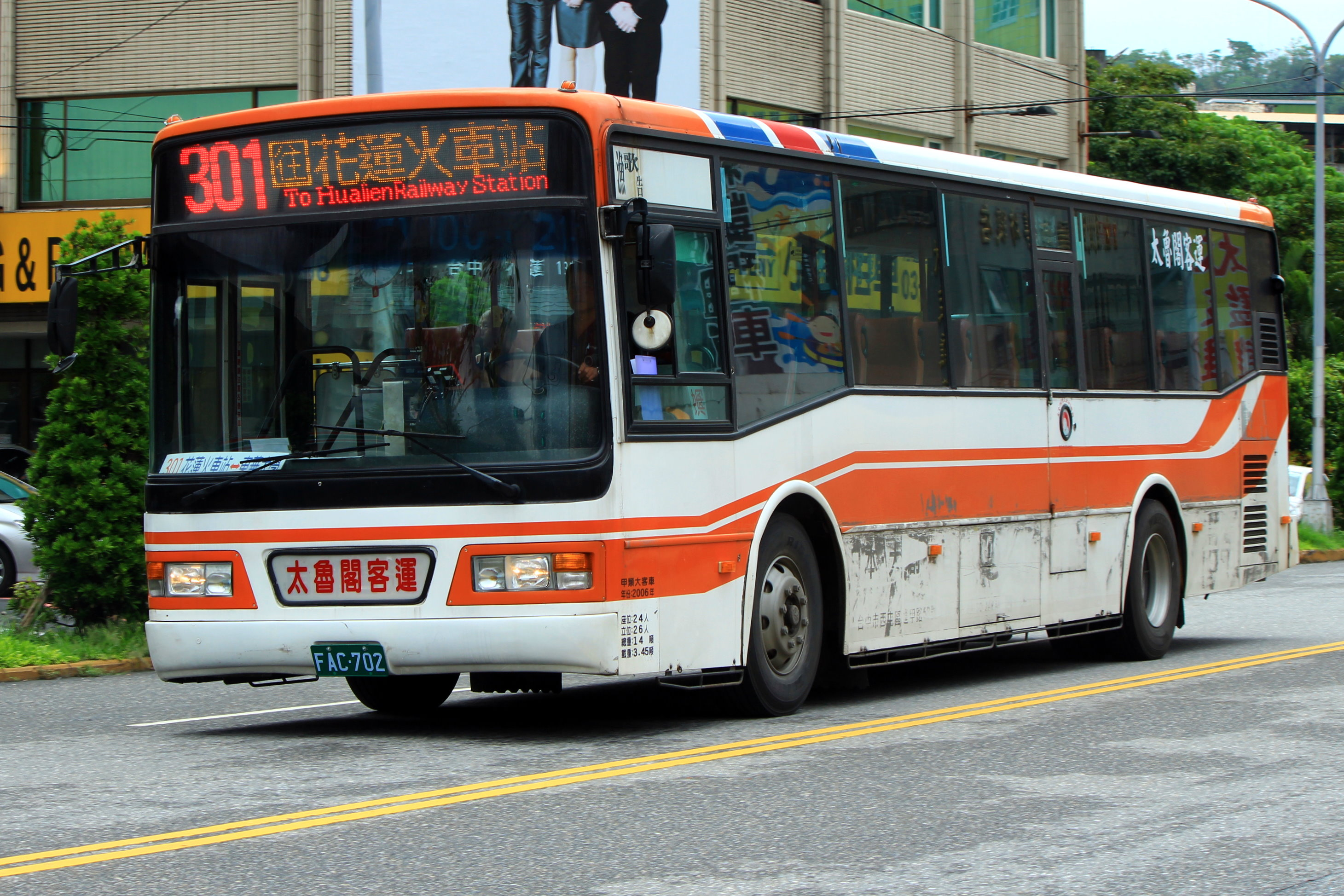 中文（台灣）: 太魯閣客運購自台中客運的三手日野ERK2JRL大客車FAC-702。